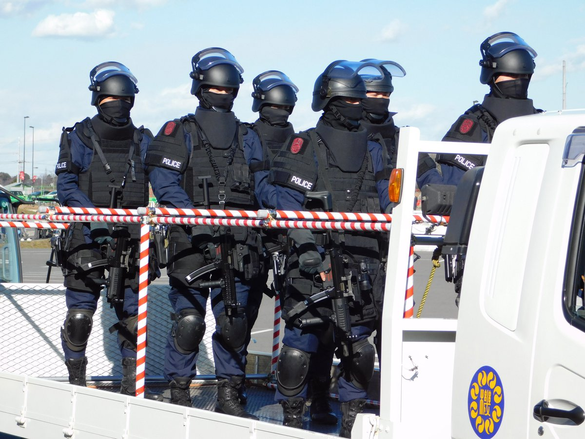 2017年の埼玉県警察年頭視閲式にて、トラックに乗って行進に臨むRATS隊員。